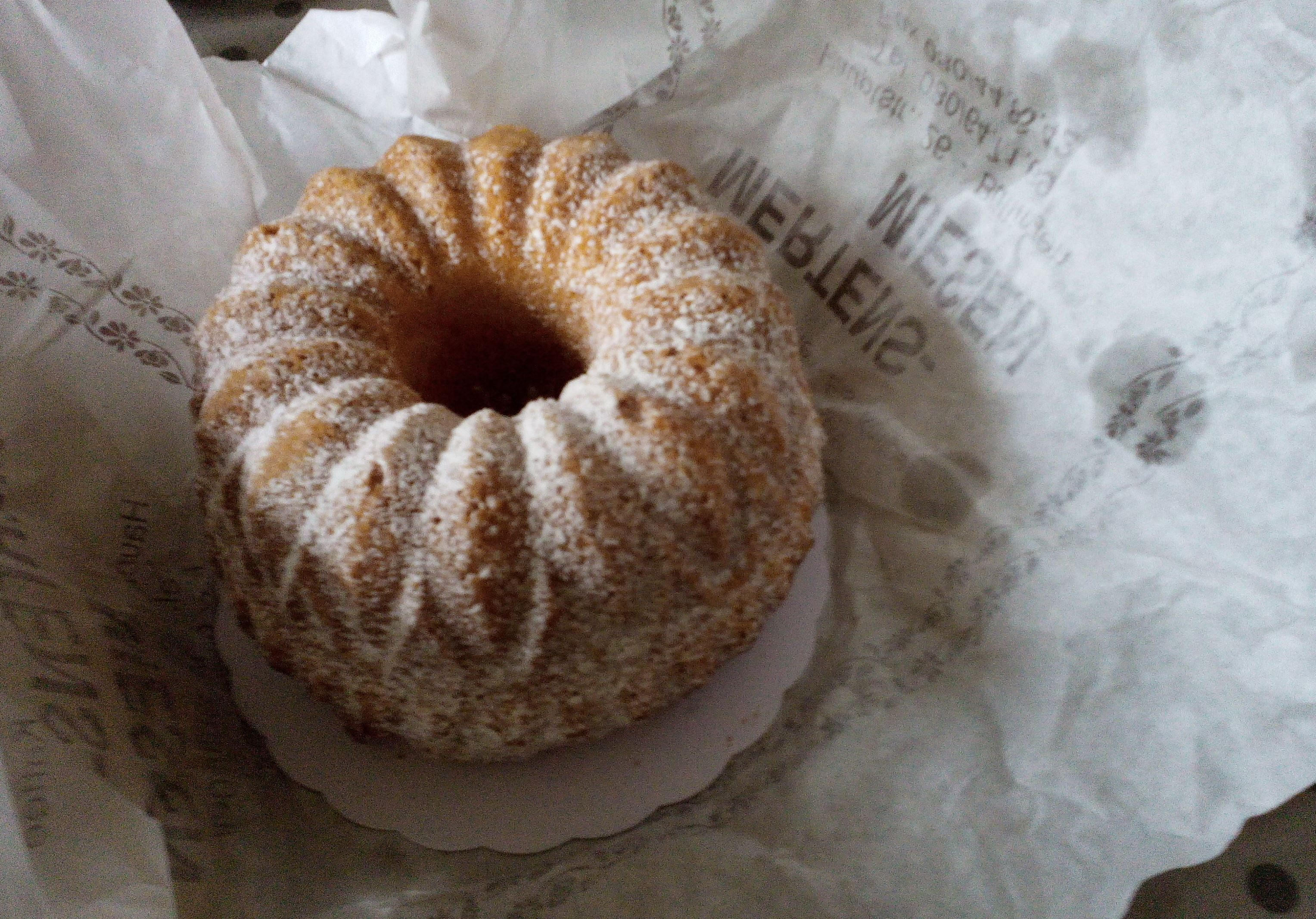 Patisserie de type Kougelhopf produite à Büllingen / Bullange (Belgique)